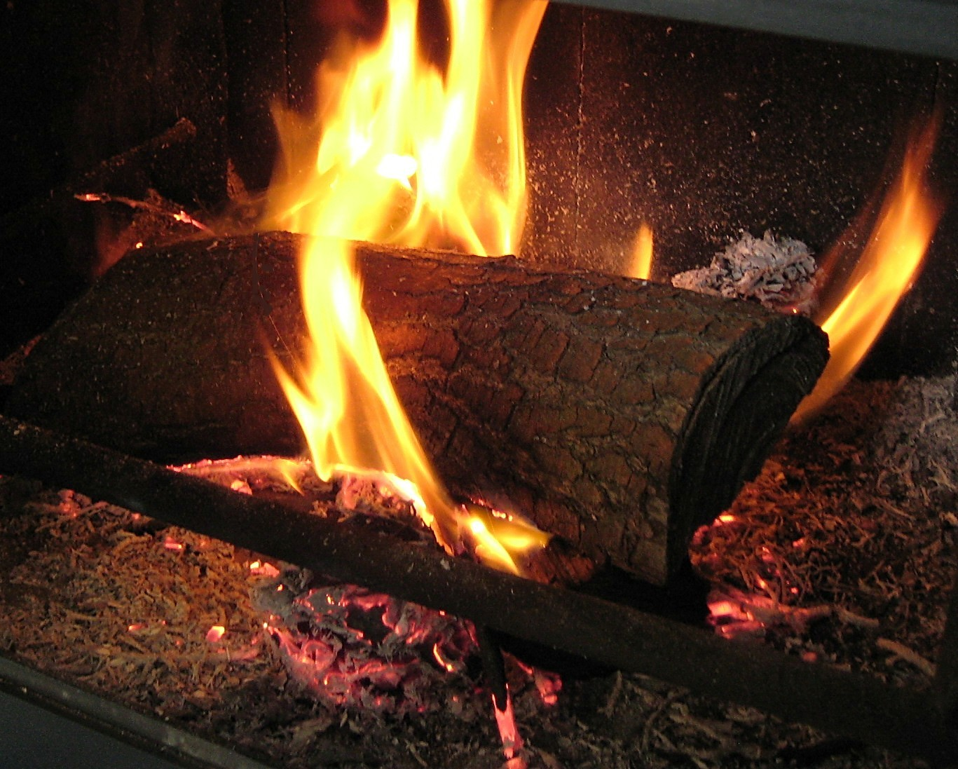 Feuer